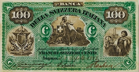 Svájc, Banca delle Svizzera Italiana 100 frank 1877.